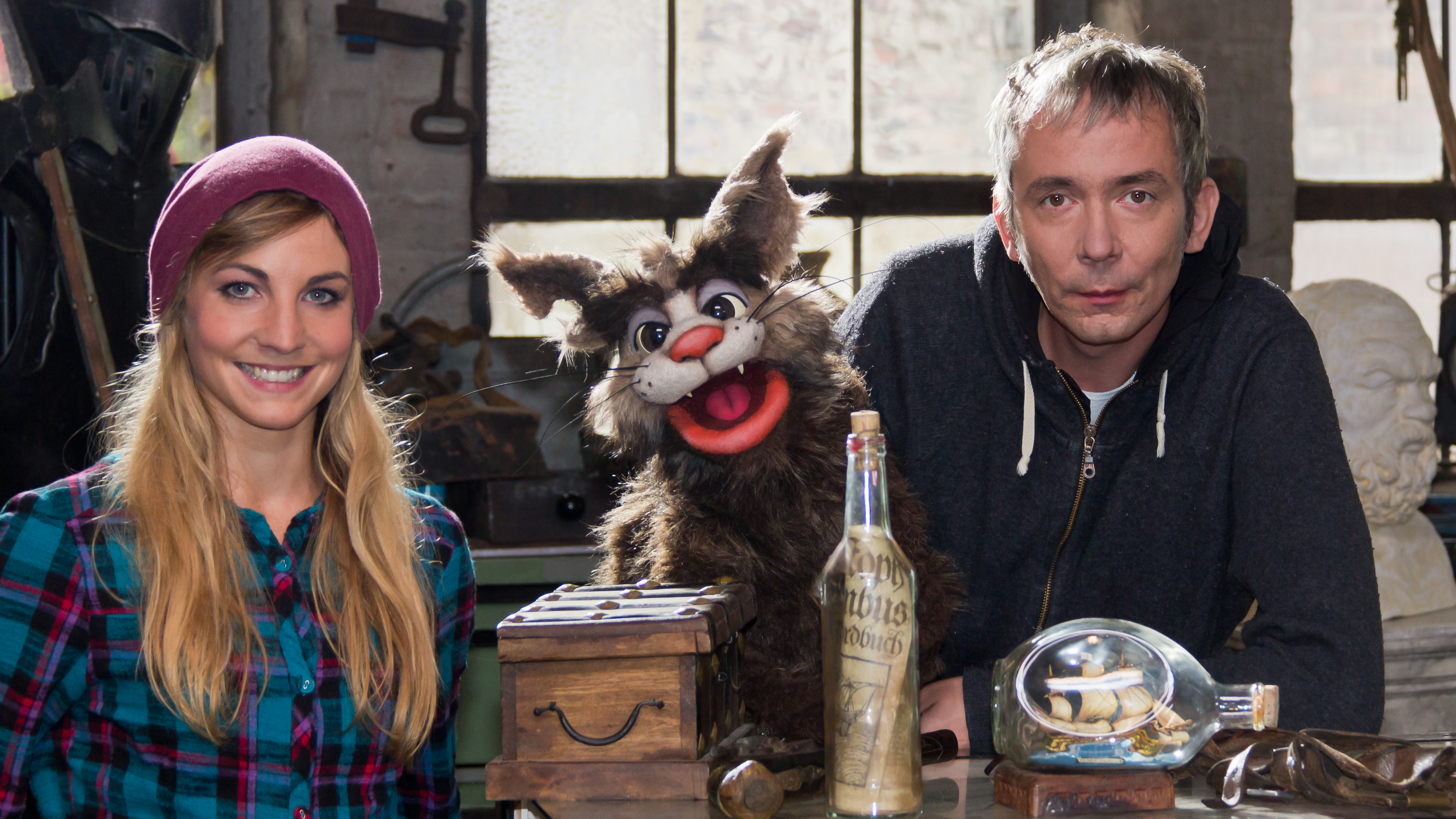 Dreharbeiten zur KiKA Geschichts-Comedy „Kaiser! König! Karl!“ im Rheinischen Industriebahnmuseum Köln Foto: Luana Bellinghausen und Klappmaulpuppe Kater Karl, gespielt und gesprochen von René Marik